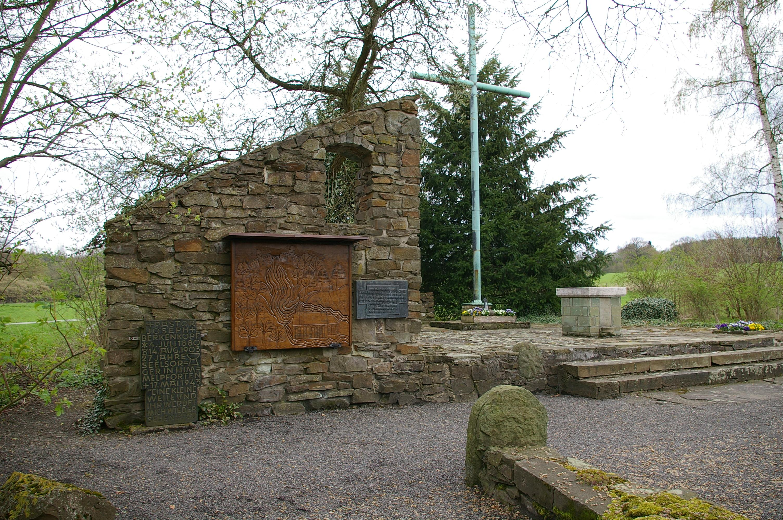 Gedenkstätte am ehemaligen Kloster Himmelpforten, das am 17. Mai 1943 durch die Flutwelle der bombardierten Möhnetalsperre zerstört wurde. Wand mit Altarraum.